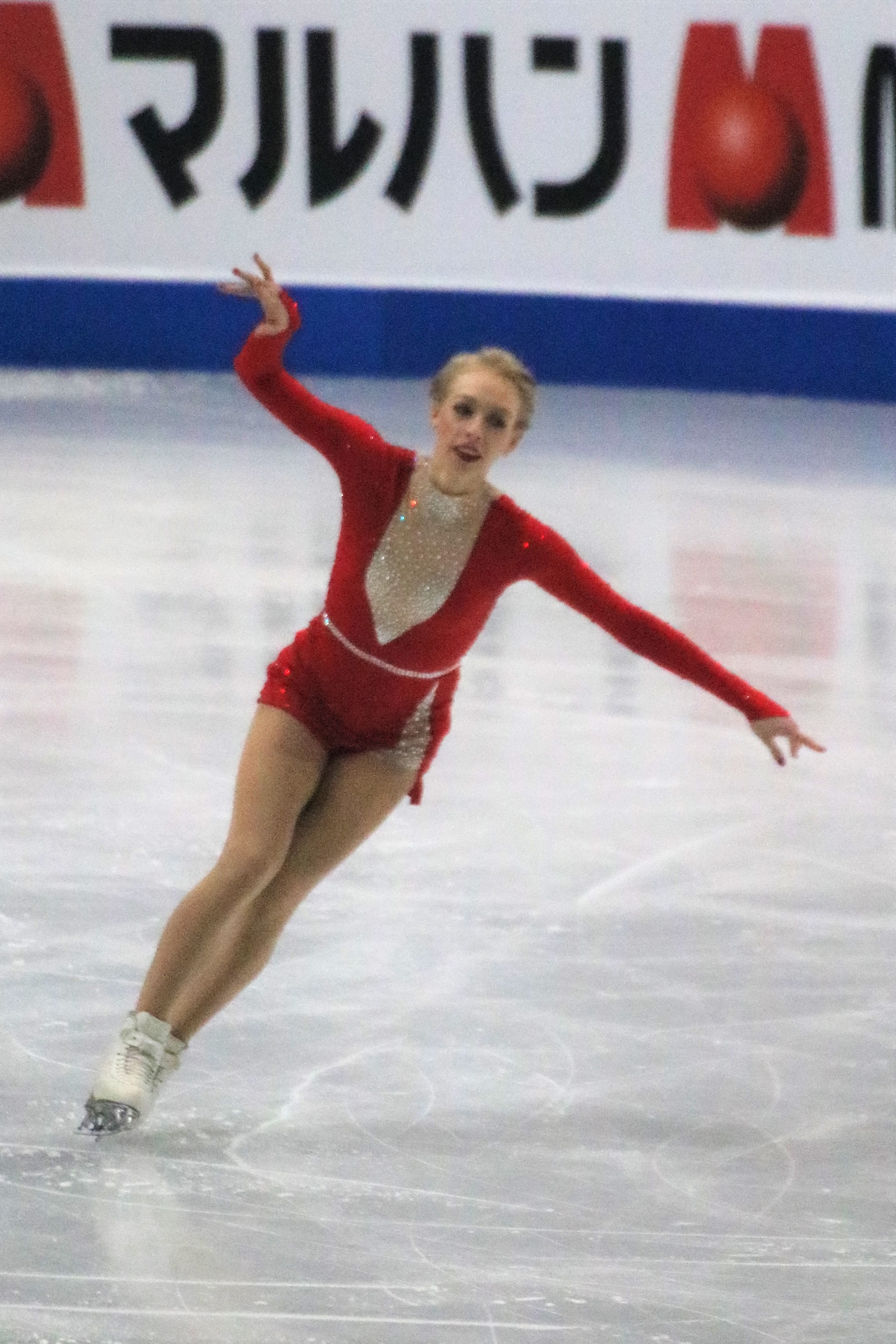 Брейди Теннел (США) на финале Гран-при 2019-2020